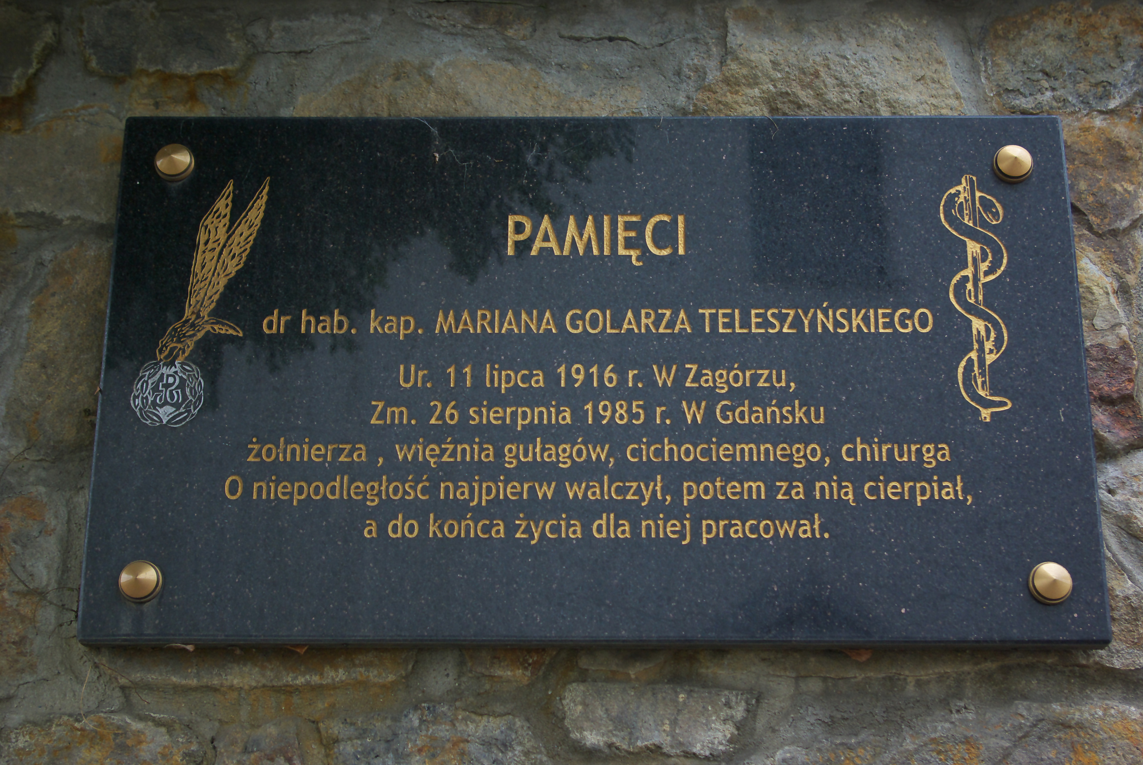 Tablica pamiątkowa w kościele Wniebowzięcia Najświętszej Maryi Panny w Zagórzu - upamiętnia dra hab. kap. Mariana Golarza Teleszyńskiego